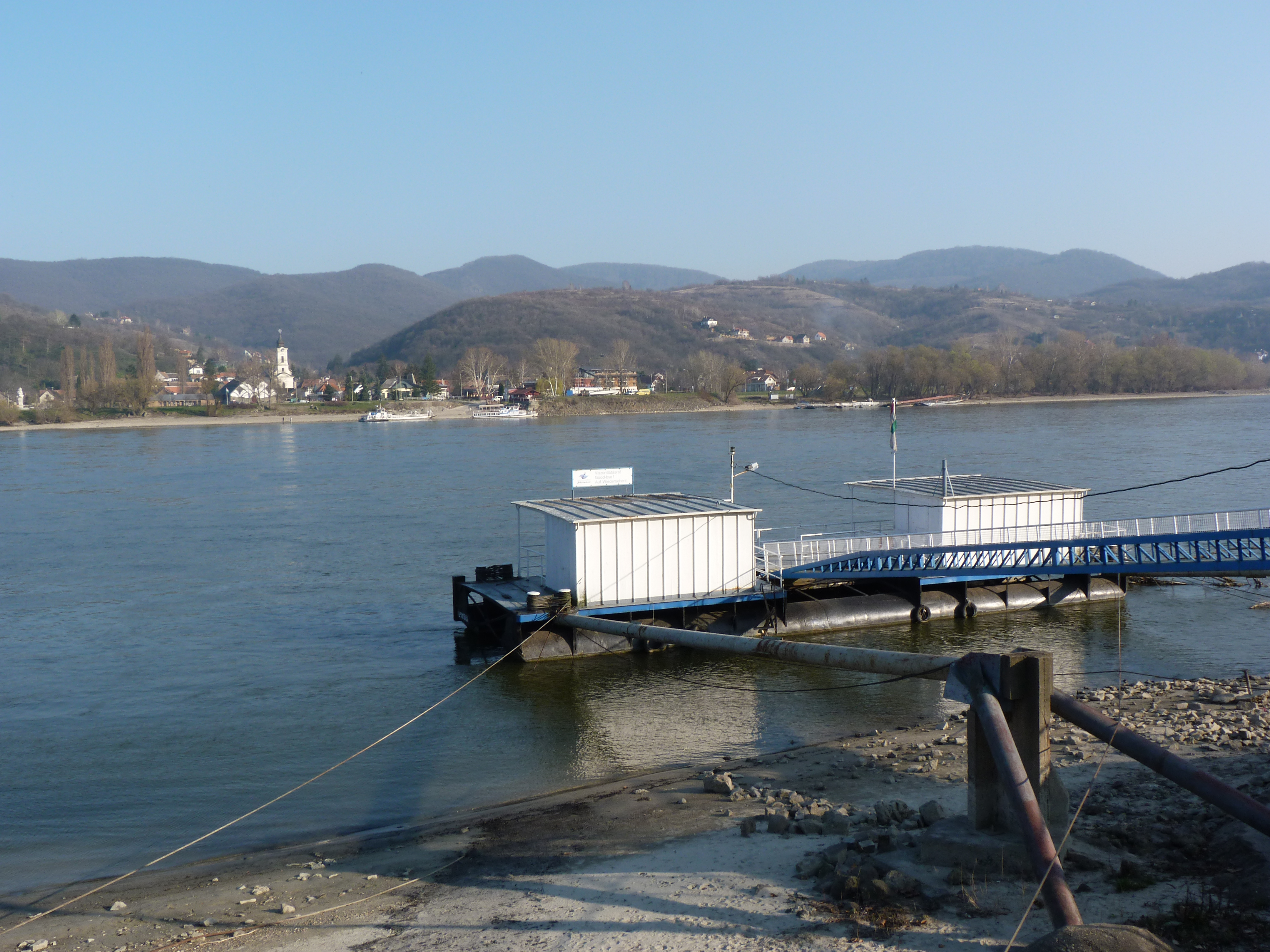 A felvétel 2014. március 14 –én pénteken készült Nagymaroson. ©© Derzsi Elekes Andor, Budapest, 2014, A kép és filmfelvételek egészben, vagy részletekben másolását, bármilyen úton történő sokszorosítását és felhasználását a szerző ellenérték nélkül, jogutódjaira is kihatóan megengedi. Az engedély kiterjed a kereskedelmi célú hasznosításra is. Kéri azonban nevének feltüntetését a felhasználás során. A Metapolisz sorozat valamennyi képe és filmje Creative Commons alatti valamint kereskedelmi - for profit - célra is felhasználható. Ajánlott hivatkozás: Derzsi Elekes Andor: Metapolisz DVD line